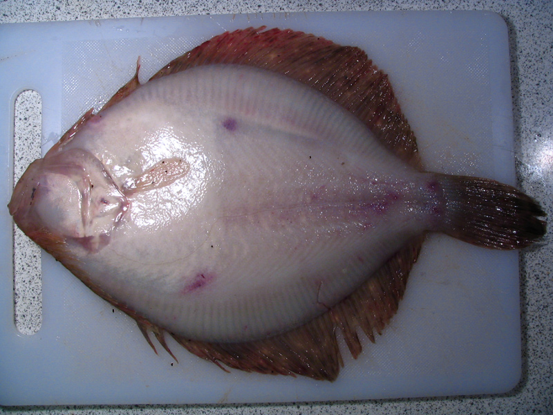 Turbot de sable, vu de dessous (côté droit qui est aveugle et non pigmenté). Photo prise par Matthieu Godbout, aux îles-de-la-Madeleine, à l'automne 2006.